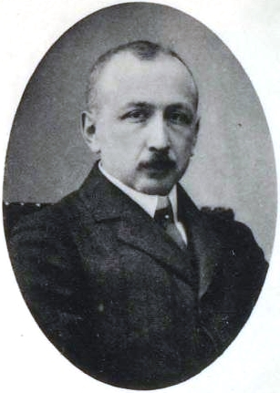 Минц, Владимир Михайлович